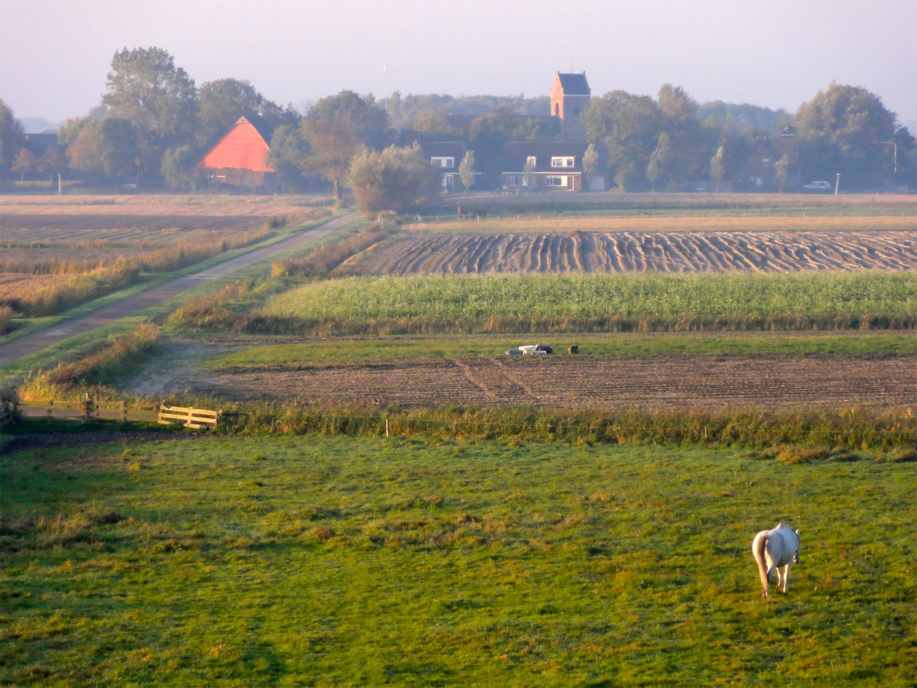 Zicht op Nes met de Sint-Johanneskerk in de gemeente Dongeradeel vanaf de Waddenzeedijk